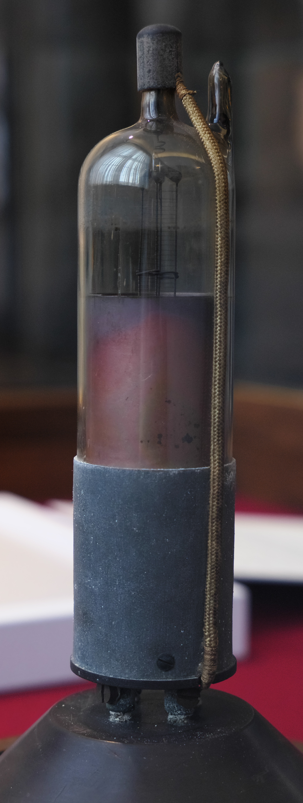 Röhrentriode Schott M aus Jena von 1917, die von Barkhausen und Kurz als Sende- und Empfangsröhre eingesetzt wurde.